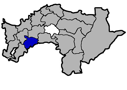 KaurJmeb為編輯臺灣省嘉義縣鹿草鄉，於2005年2月10日所繪